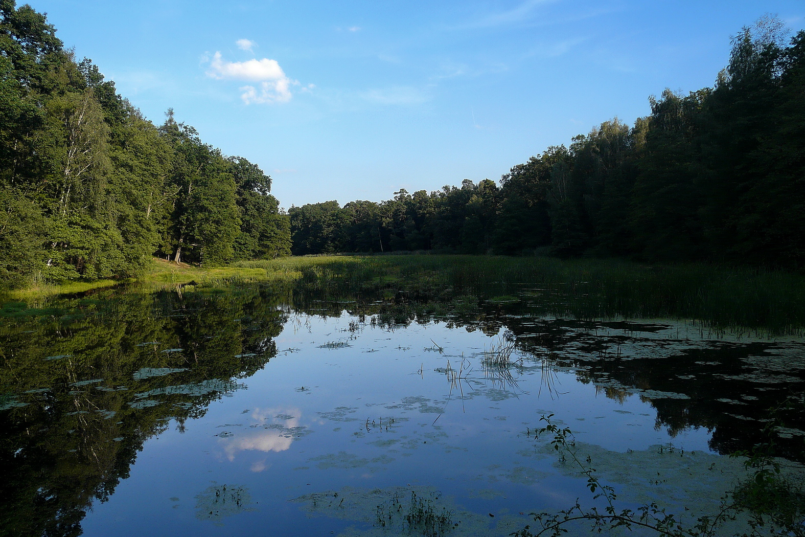 Štičí rybník v Jabkenické oboře